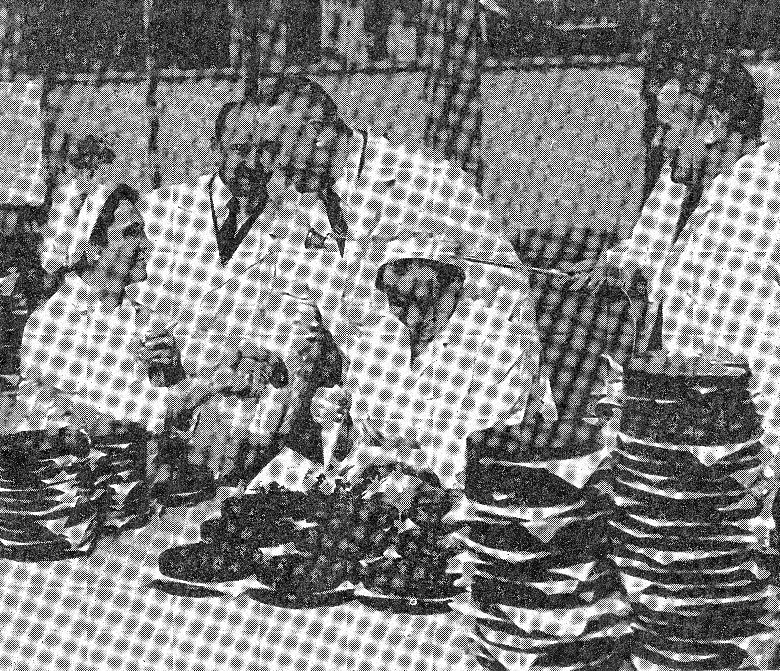 Wizyta I sekretarza KC PZPR Edwarda Gierka w Zakładach im. 22 lipca (d. E. Wedel) w Warszawie